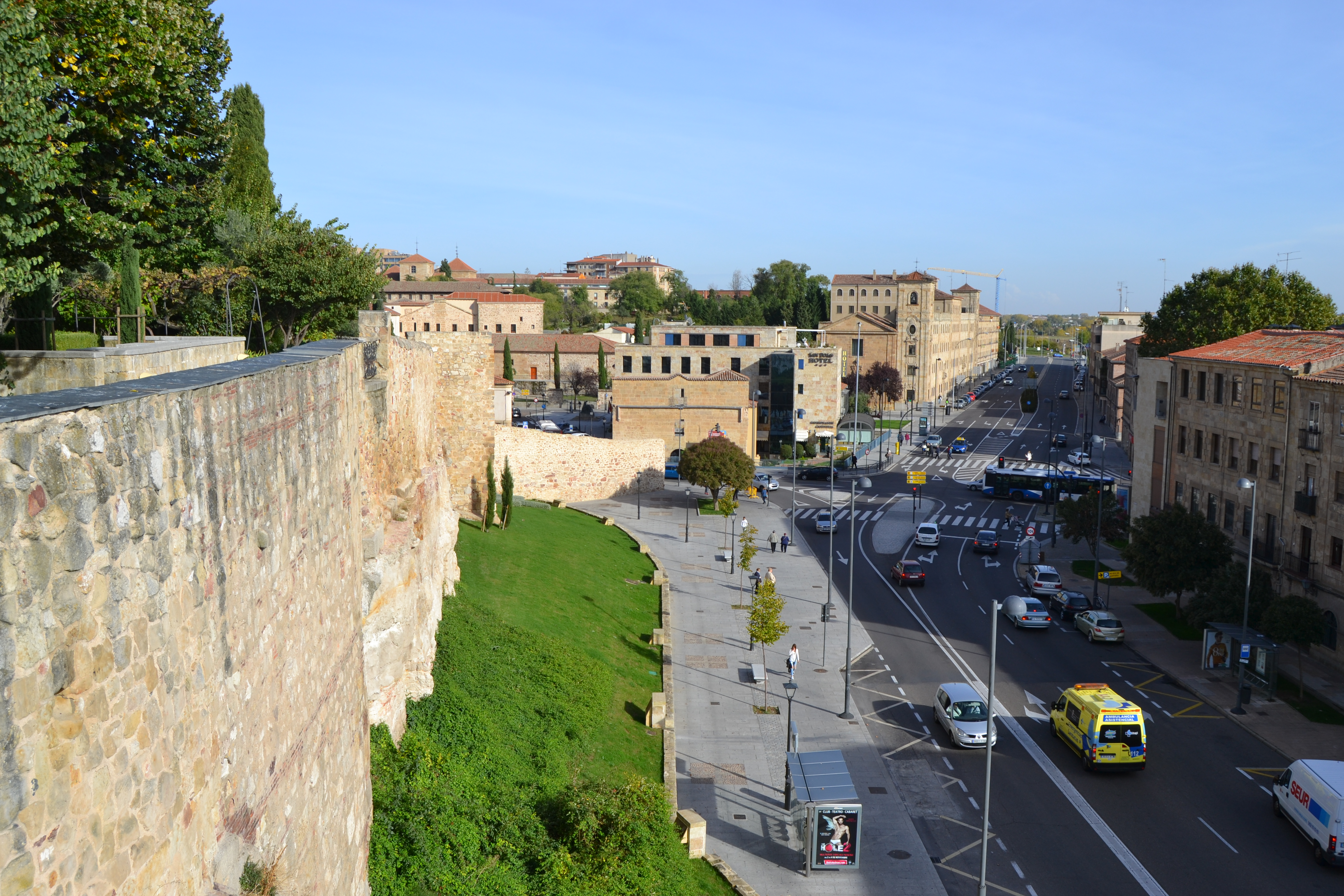 Salamanca, Castilla y León, España. Octubre de 2016.